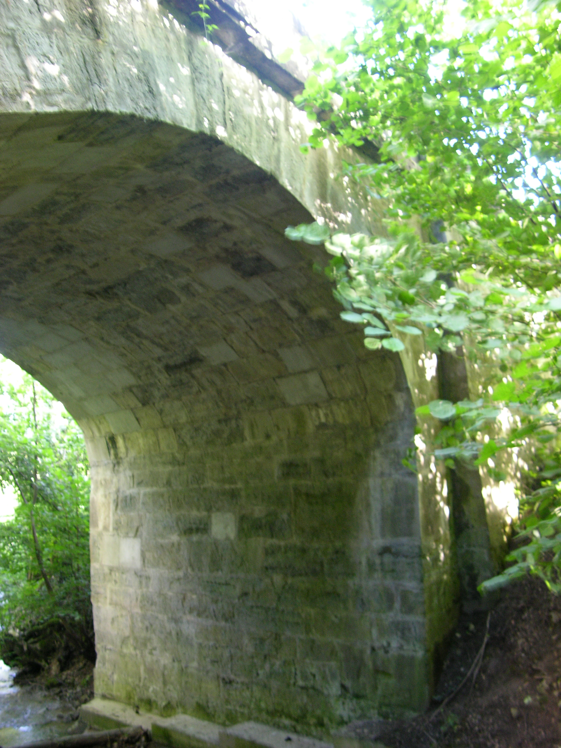 Küttigen: Schällebrugg (bachabwärts fotografiert)